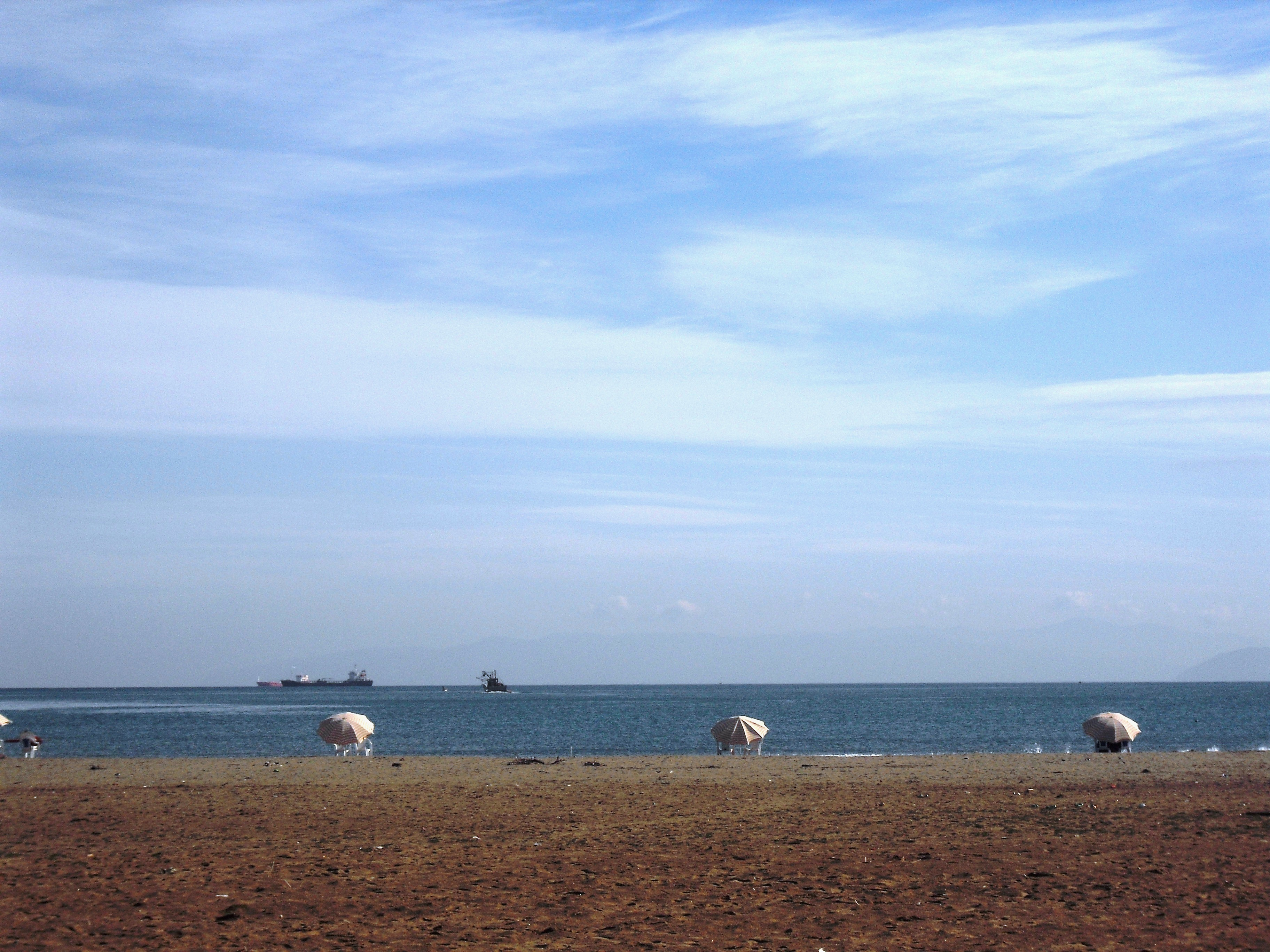 La plage de Kotama à la ville de Jijel (Algérie), photo de mon propre travail juste pour l'utilisation libre sur Wiki